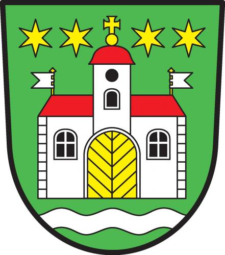 Znak obce Věž